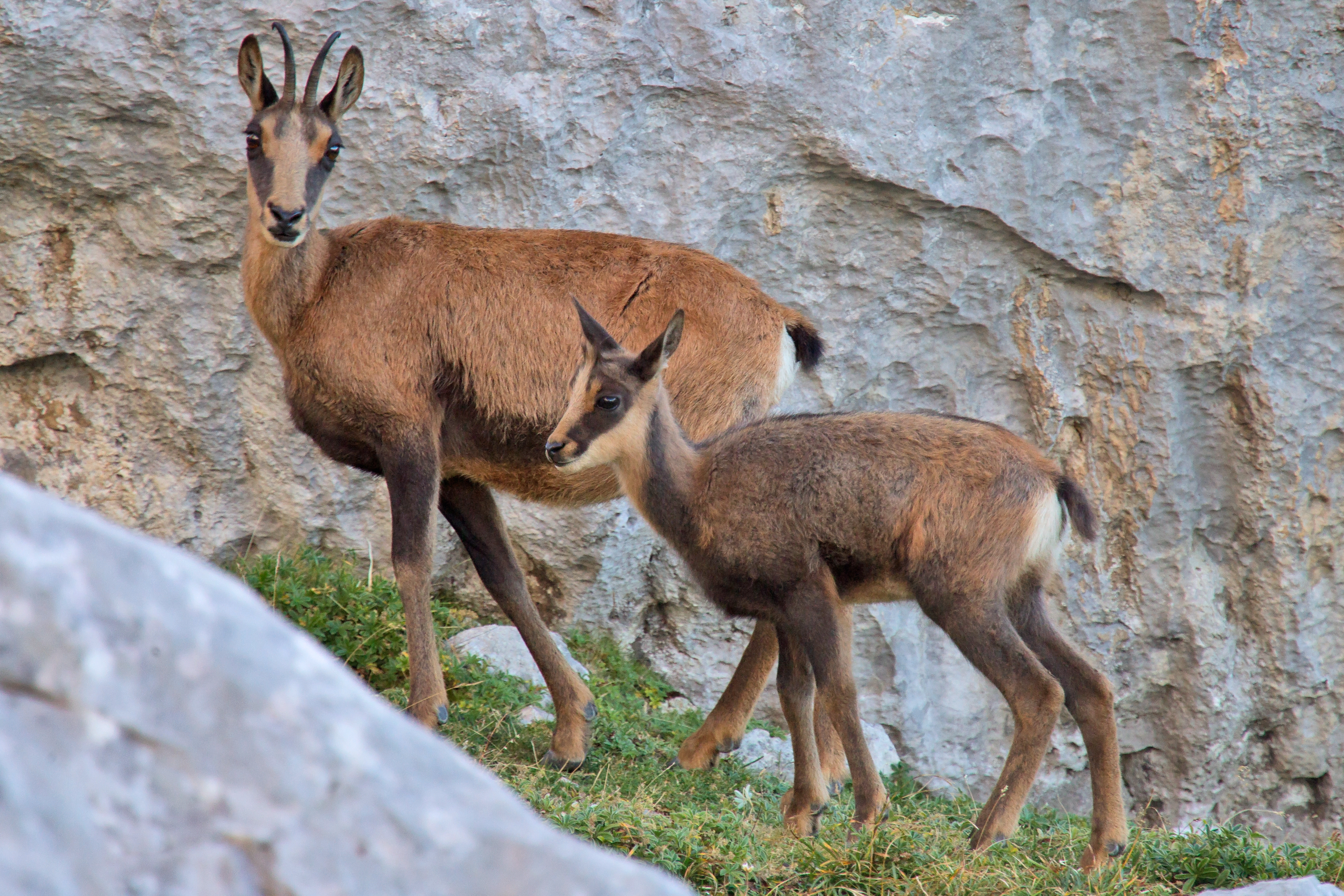 Rebecos (Rupicapra pyrenaica parva)